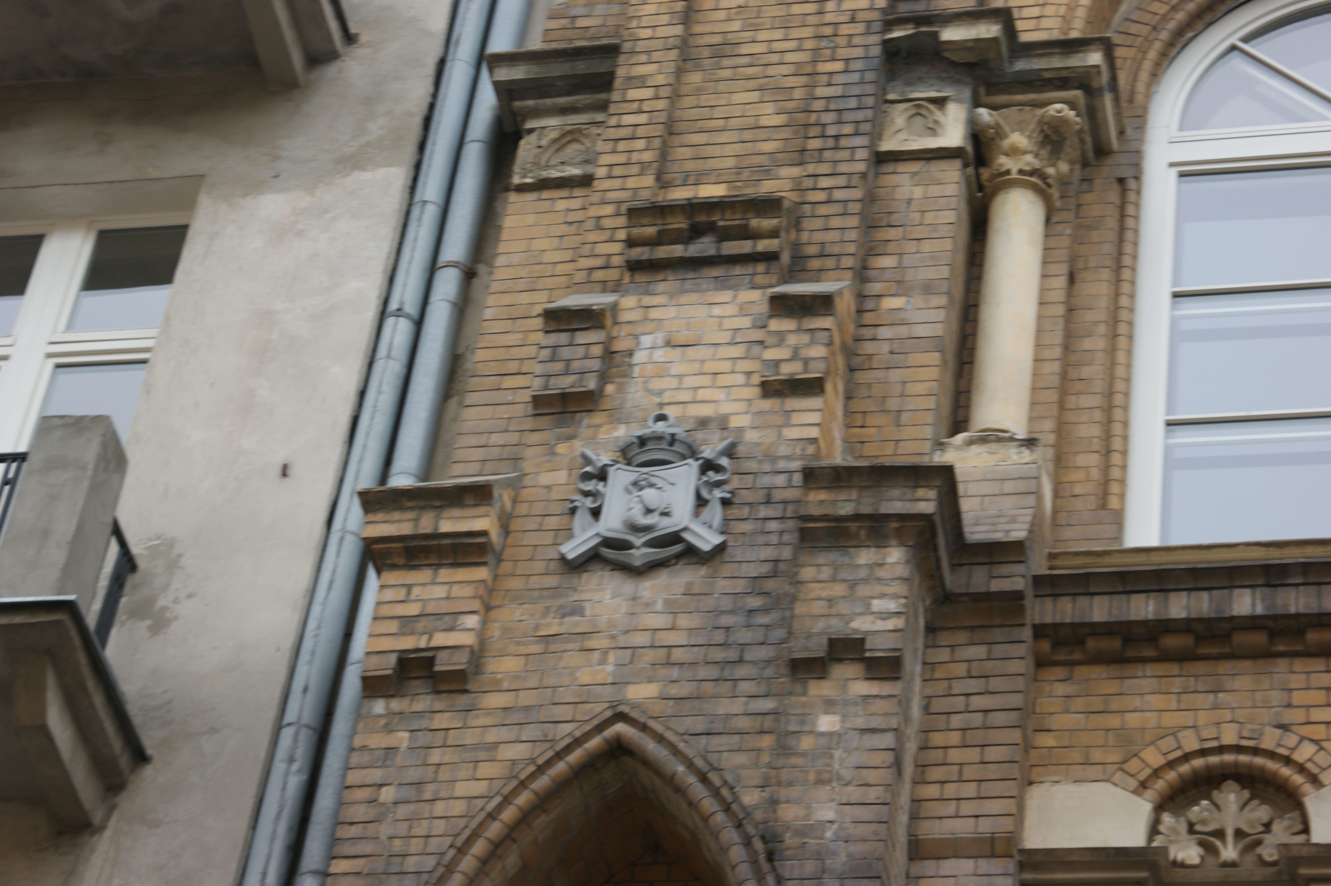 Herb zamieszczony na gmachu WTW